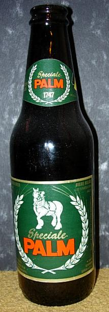 Bierflesje foto: eigenwerk Snoop